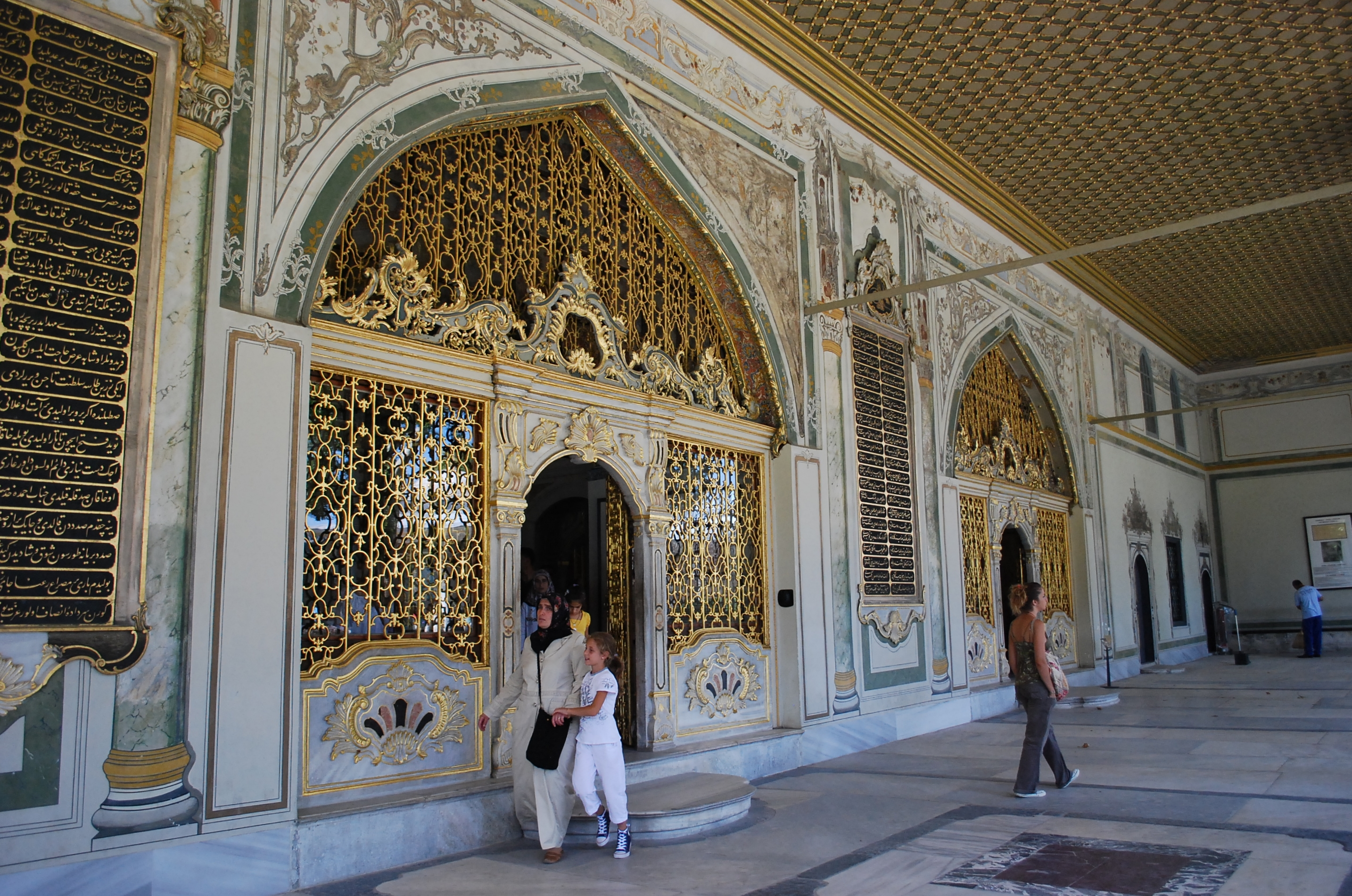 Архитектурный комплекс дворца